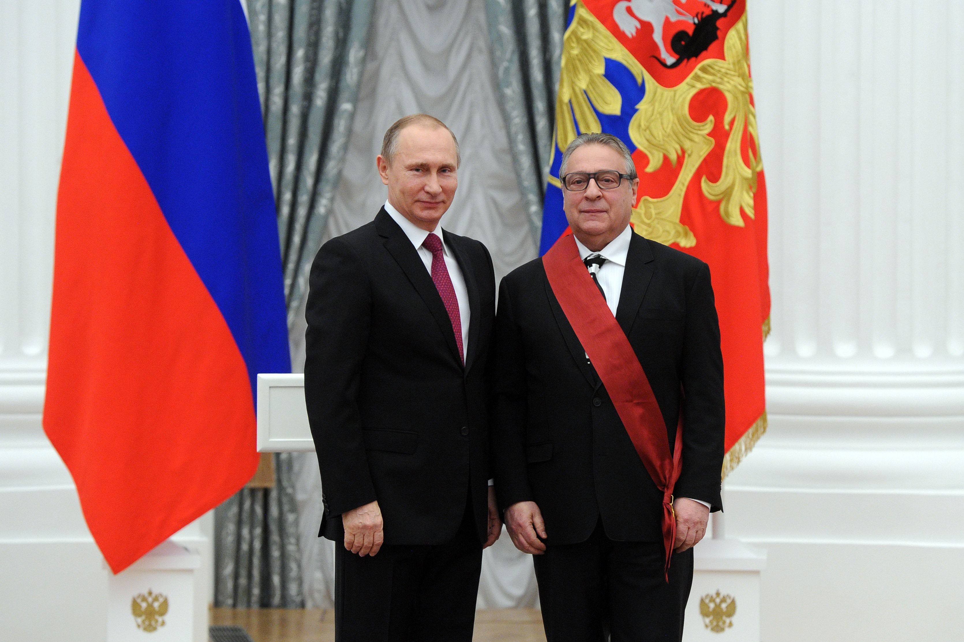 На церемонии вручения государственных наград Российской Федерации. Орденом «За заслуги перед Отечеством» I степени награждён художественный руководитель Московского государственного театра эстрады Геннадий Хазанов.